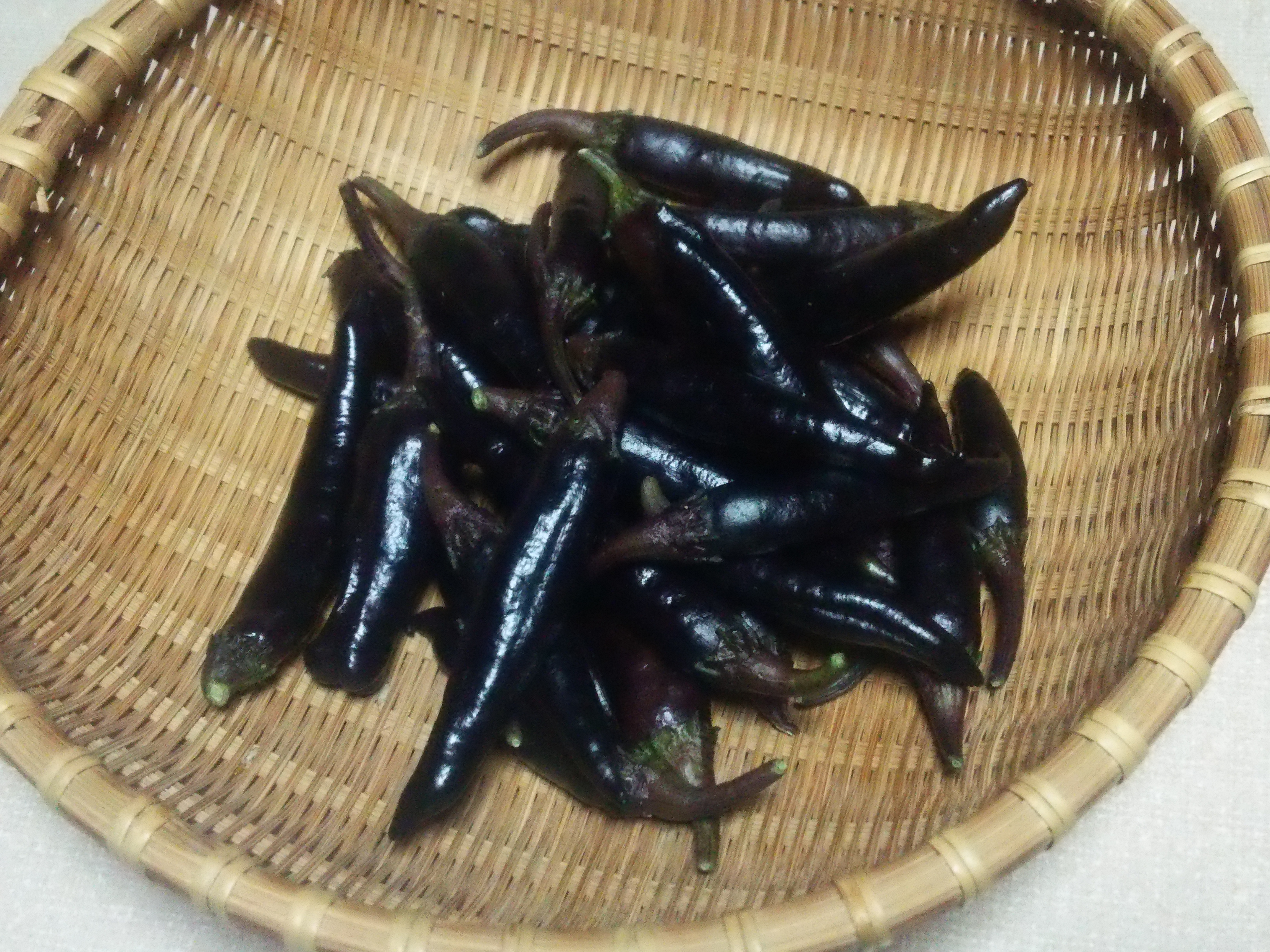 大和伝統野菜「紫とうがらし」